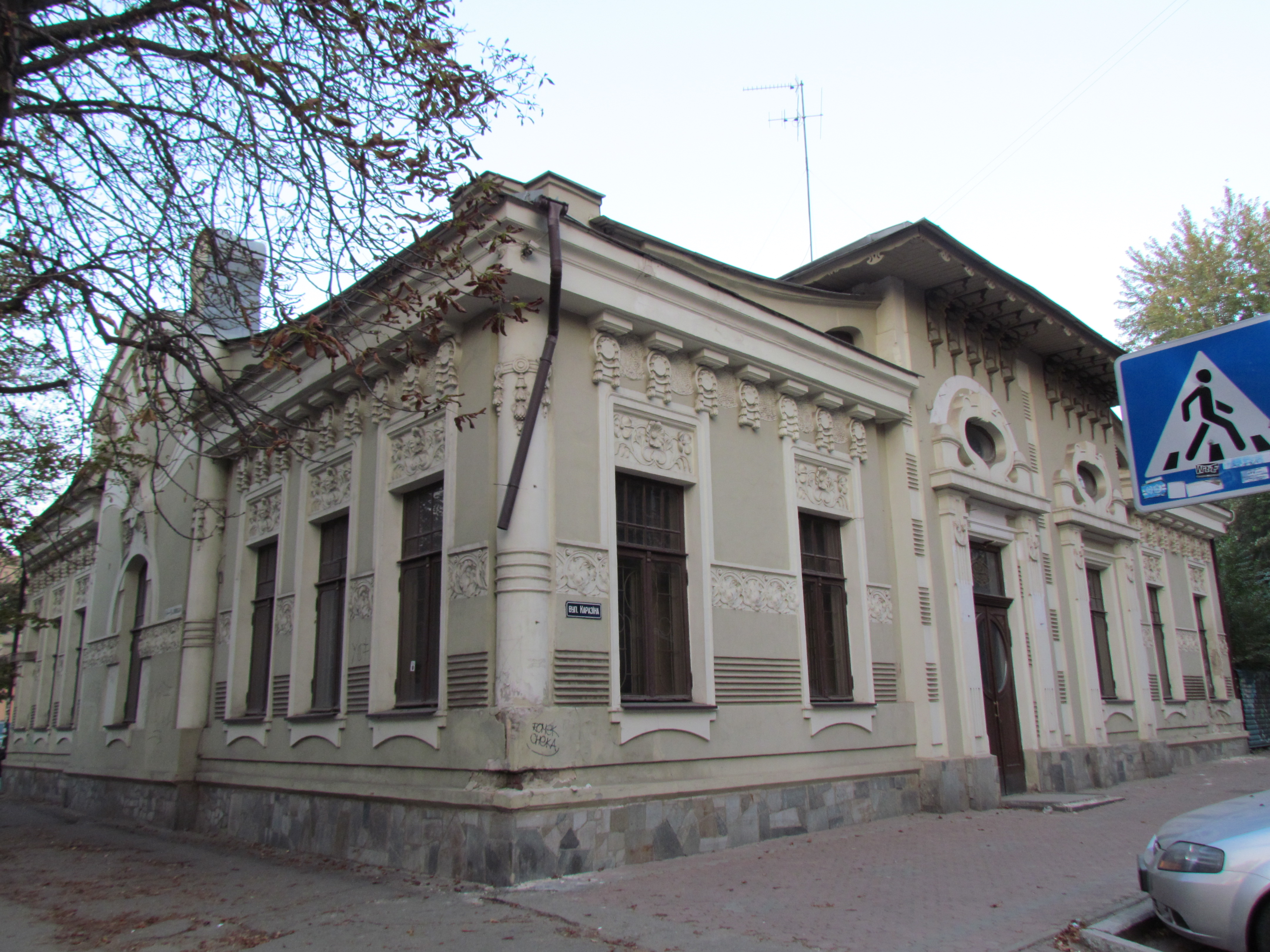 Україна, Харків, вул. Каразіна, 5